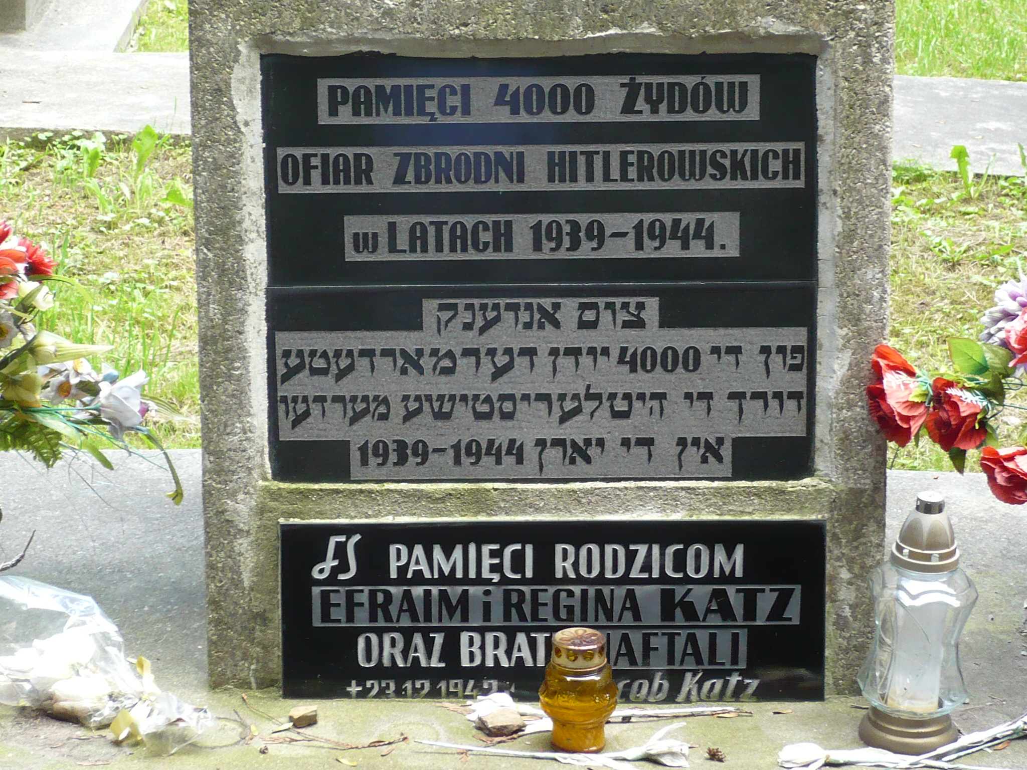 Przemyśl, nowy cmentarz żydowski